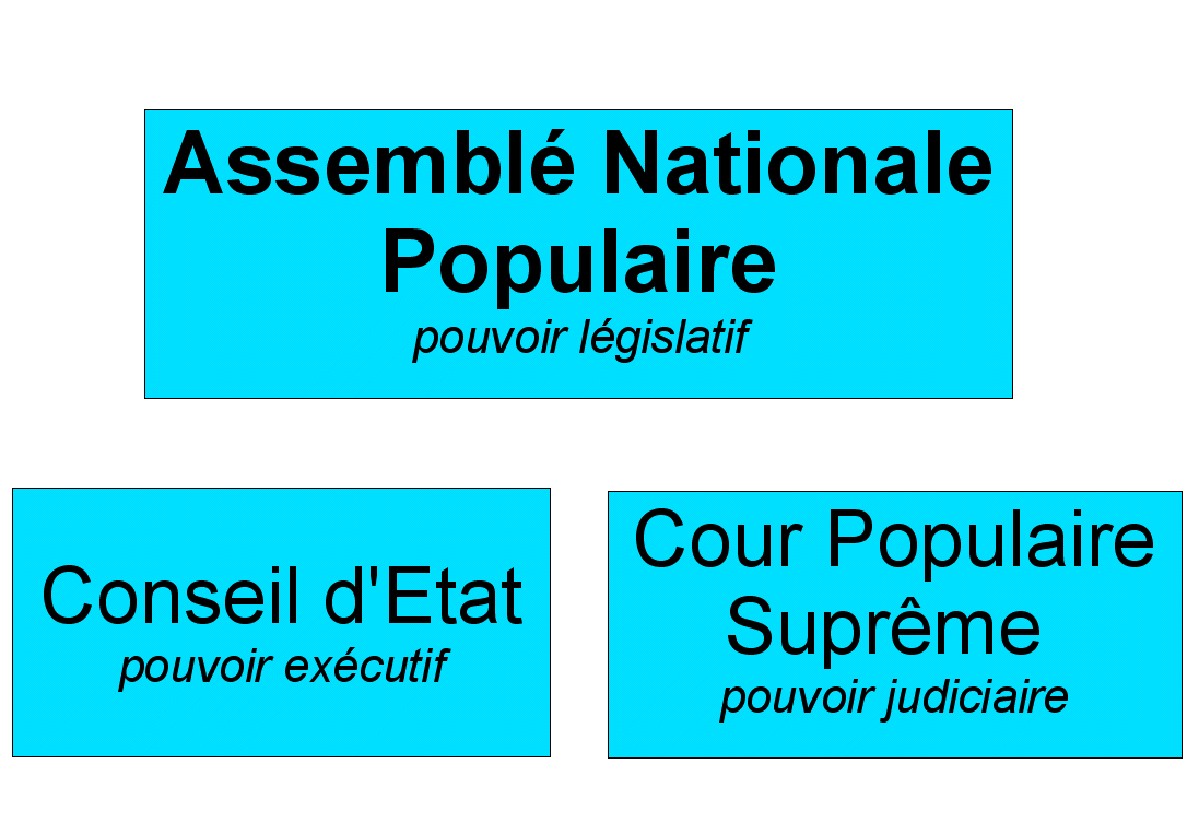 RPC Schéma de la relation entre les pouvoirs selon la constitution